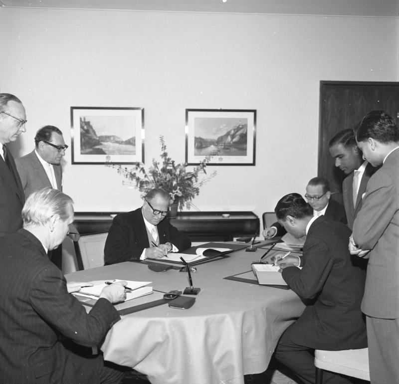 Deutsch-Indisches Kreditabkommen, Unterzeichnung im Auswärtigen Amt